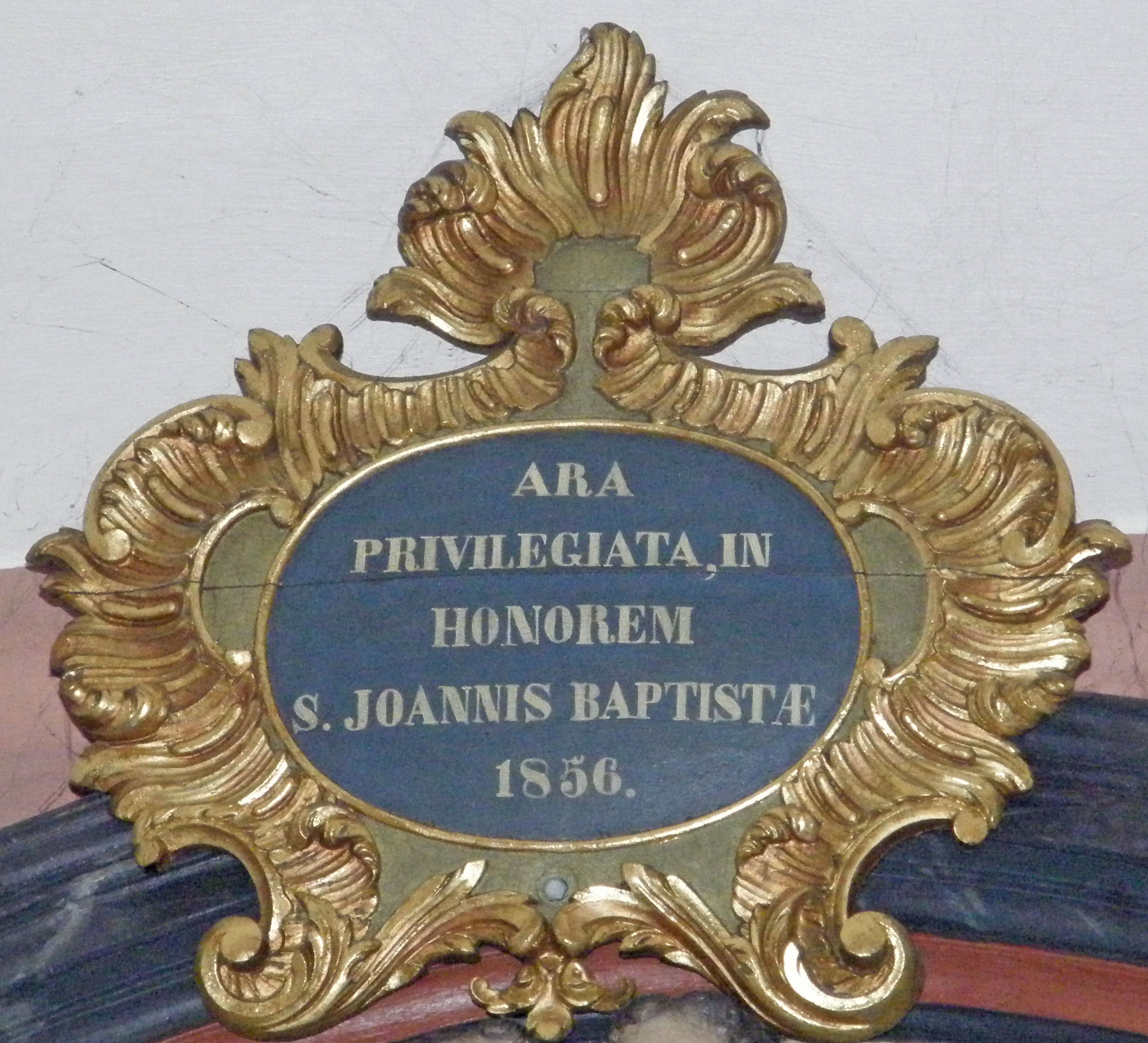 De Rokoko-Medaillon ganz uewen um Haaptaltor an der Kierch zu Feelen.